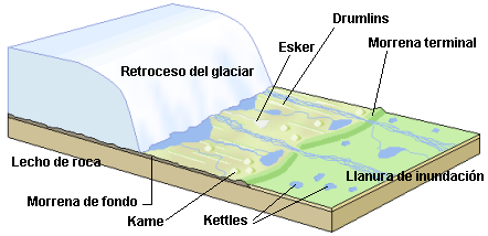 Autor: Usuario:Lmb